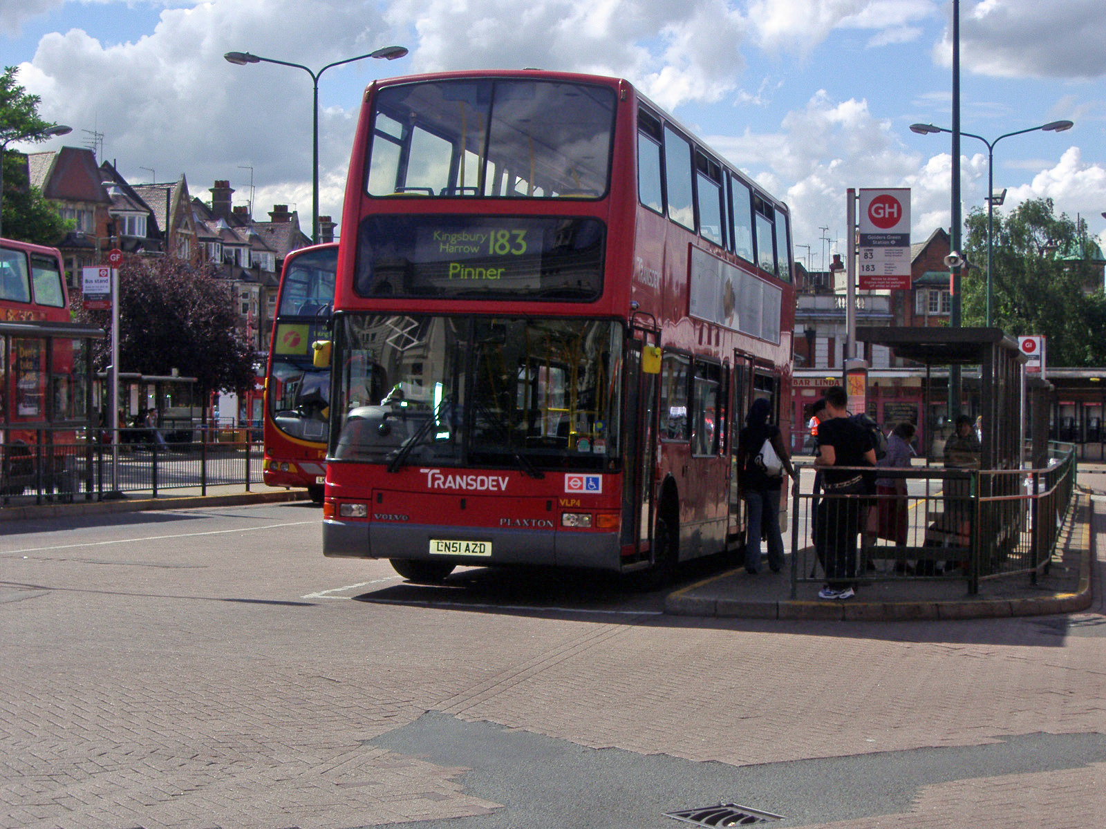 183 stop